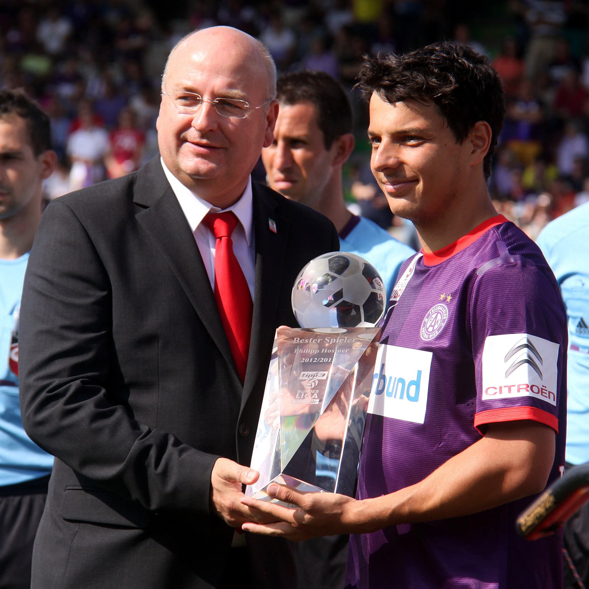 Meisterschaftsspiel der österreichischen Bundesliga: FK Austria Wien gegen FC Admira Wacker Mödling am 20. Juni 2013 (2:0)] in der Generali-Arena. - Das Foto zeigt Bundesliga-Präsident Hans Rinner (links) bei der Übergabe der Auszeichnung für den besten Spieler der Saison 2012/13 an Philipp Hosiner.